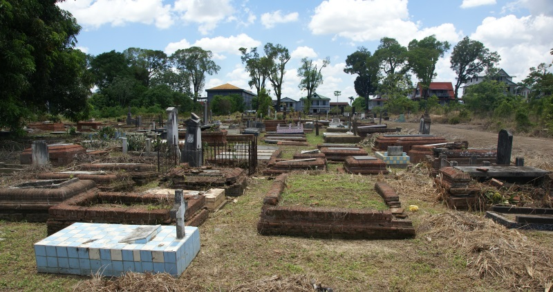 Nieuwe Oranjetuin - Dr J.F. Nassylaan 8, Paramaribo, Suriname